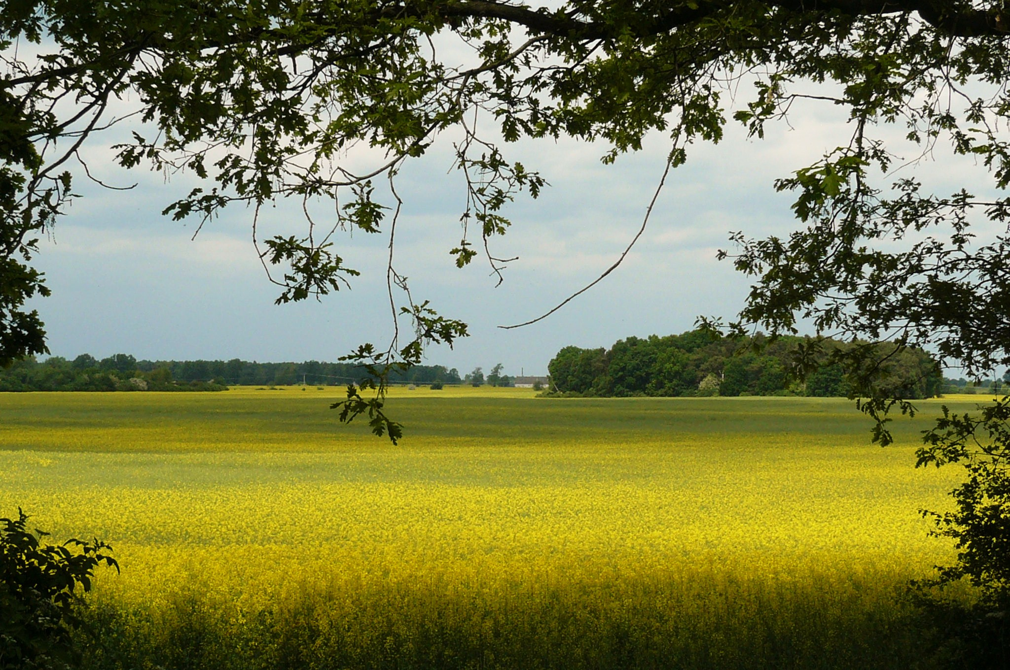 Las Bytyński.